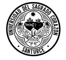 Logo USC